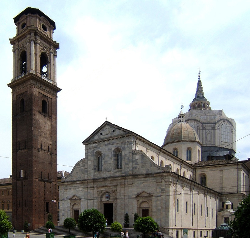 Duomo